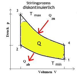 Skizze P_V Diagramm